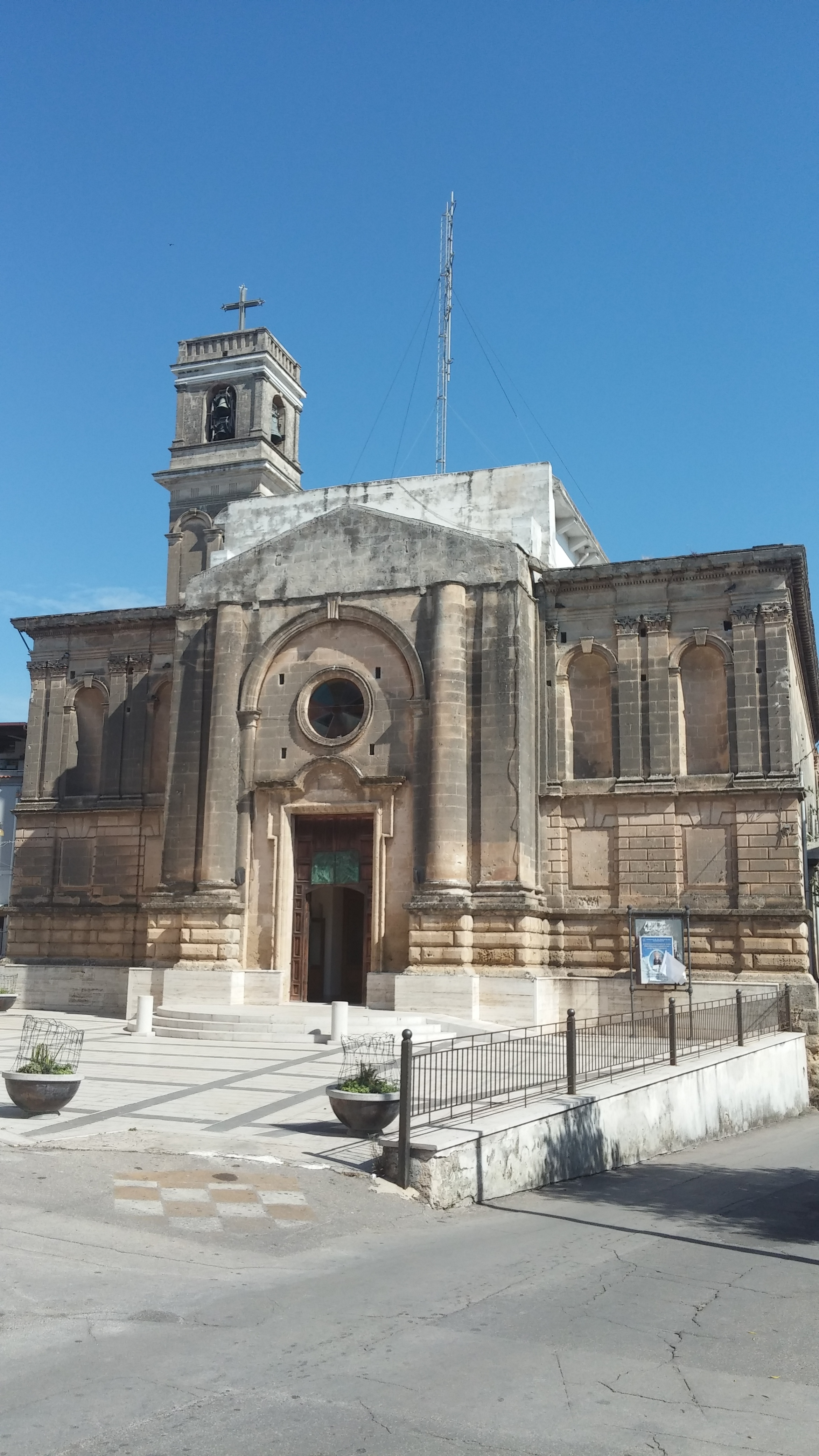 Sagrato